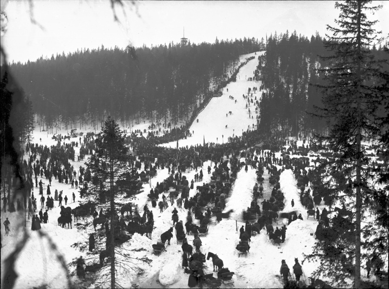 Holmenkollbakken